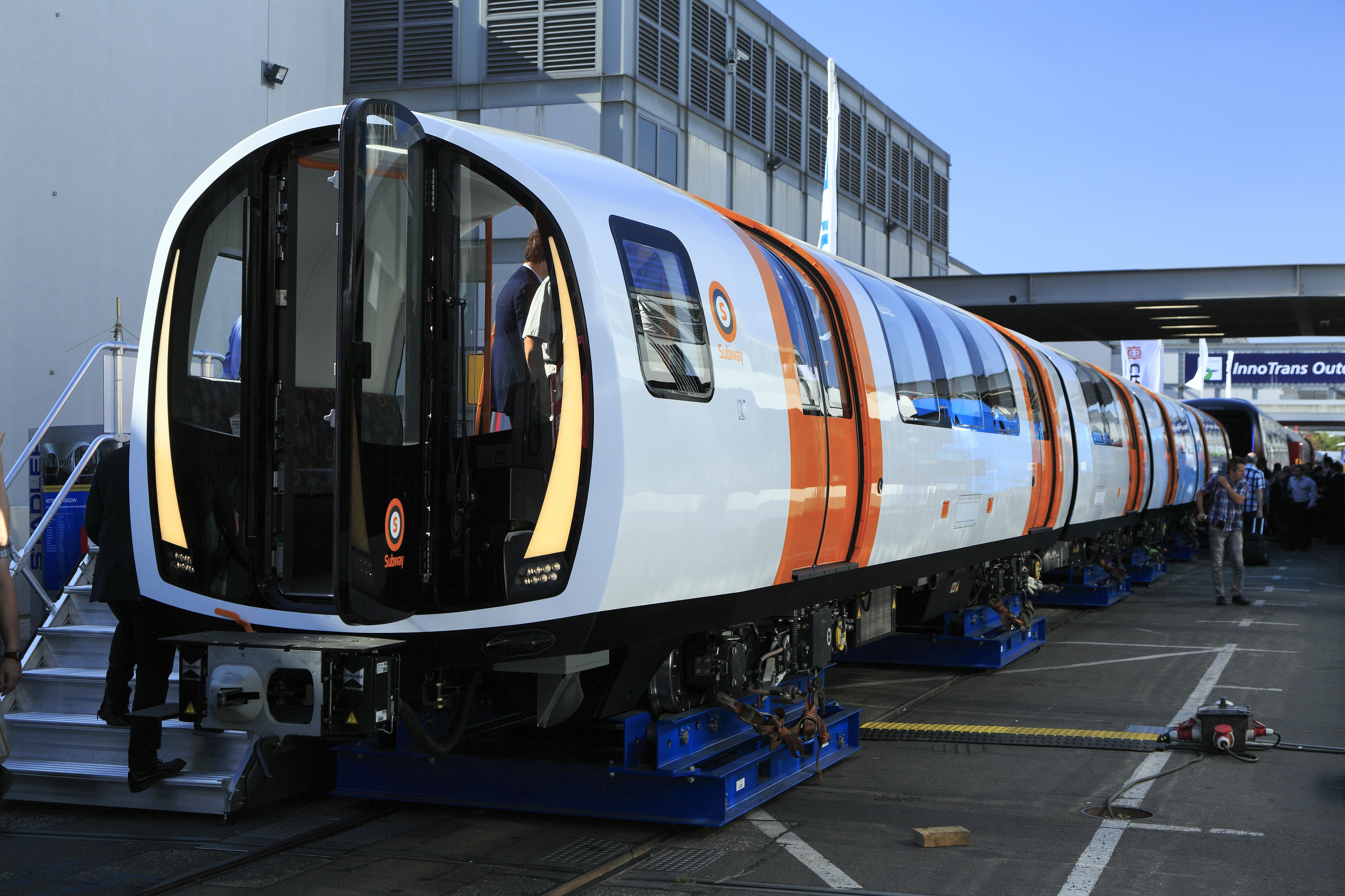 Wegen der außergewöhnlichen Spurweite von 1220mm (ursprünglich 1219mm, vier englische Fuß) und der besonders engen Röhrentunnel mit einem Durchmesser von 3,35m Durchmesser erfordert die Ringstrecke von Glasgow eigenständige Konstruktionen, die den Londoner Röhrenbahnwagen nur äußerlich ähnlich sind. Die Ringstrecke in Glasgow wird ohne Fahrtrichtungswechsel befahren, am hinteren Ende hier im Bild gibt es deshalb nur einen ausklappbaren Hilfsführerstand. Neu sind die Scharfenbergkupplungen mit Kontaktaufstzen. Ob diese für den Betrieb von Doppeleinheiten vorgesehen sind oder nur das Abschieben von liegengebliebenen Zügen vereinfachen sollen, ist noch nicht erkennbar.